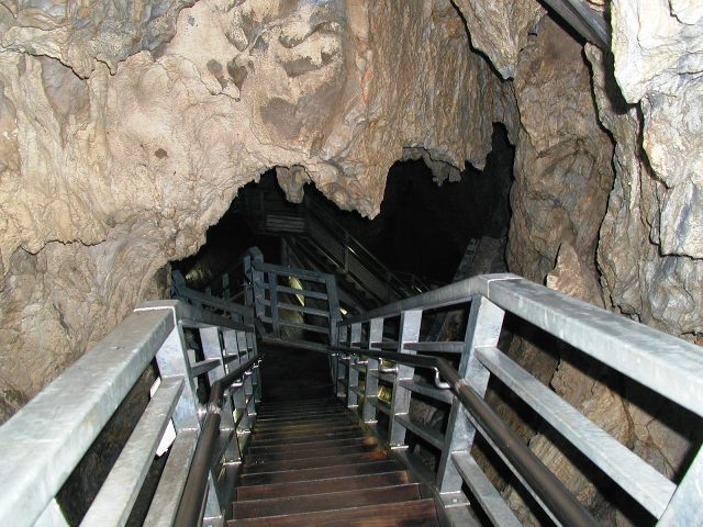 Ryūsendō interior, Iwaizumi, Iwate, Japan